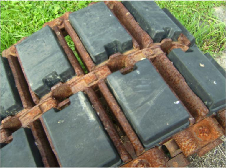 Panzerkette